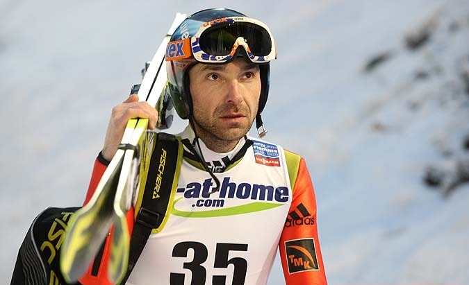 Dmitrij Wasiljew podczas konkursu indywidualnego mężczyzn na skoczni normalnej w ramach Mistrzostw Świata 2013.